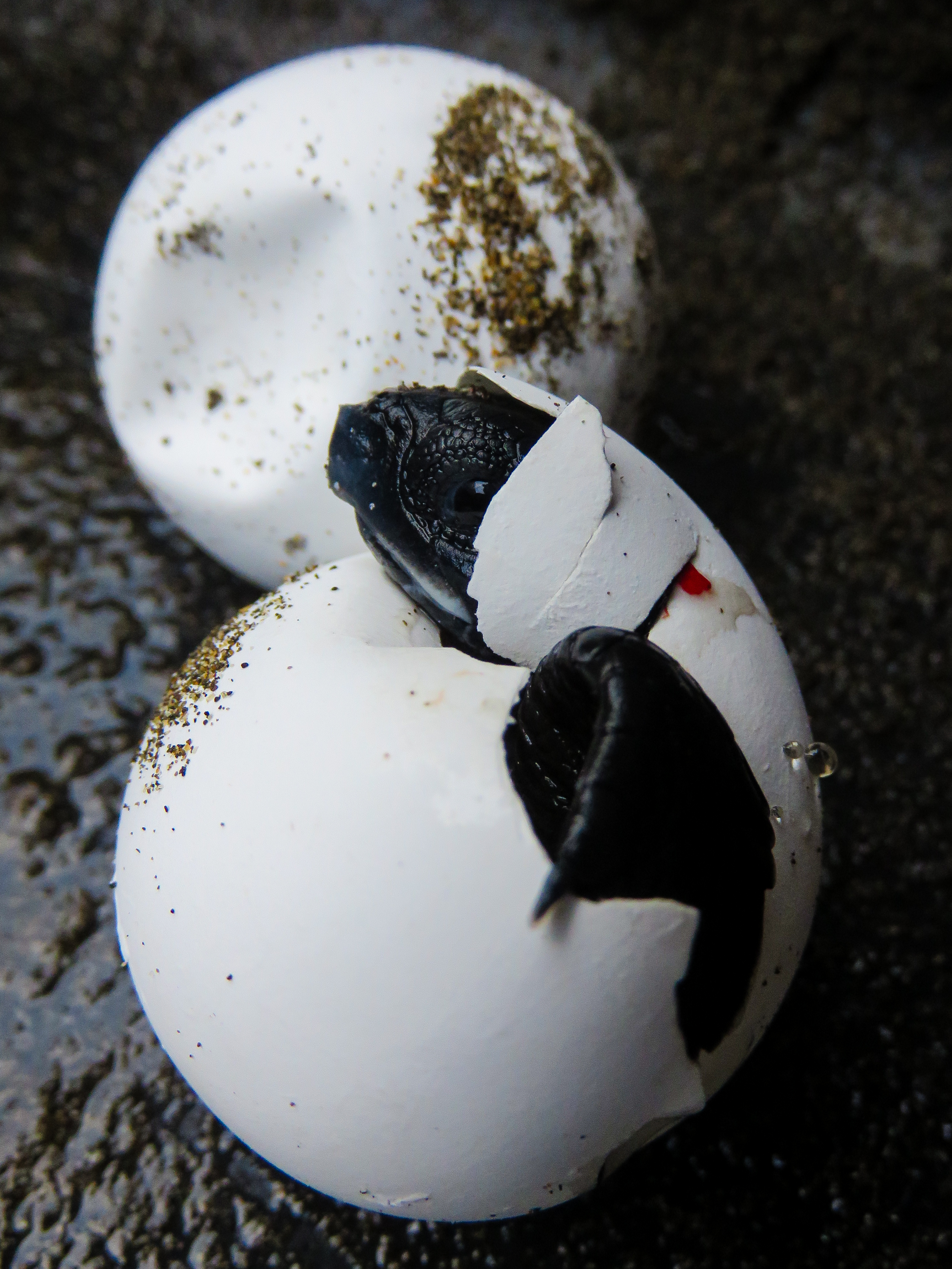 Kebedaraan penyu dialam sudah sedikit/terancam punah. Penyu ini adalah jenis penyu yang terkecil dari jenis penyu lainnya. Warna karapasnya abu-abu kehijauan, tukik berwarna abu-abu. Dengan adanya perburuan dari manusia atau predator, Selain pencurian telur dan tertangkap tidak sengaja oleh jaring nelayan, kehilangan habitat atau perubahan fungsi habitat peneluran yang berubah adalah sebuah ancaman. Misalnya banyaknya kawasan pesisir yang telah berubah menjadi pemukiman atau fasilitas pariwisata.